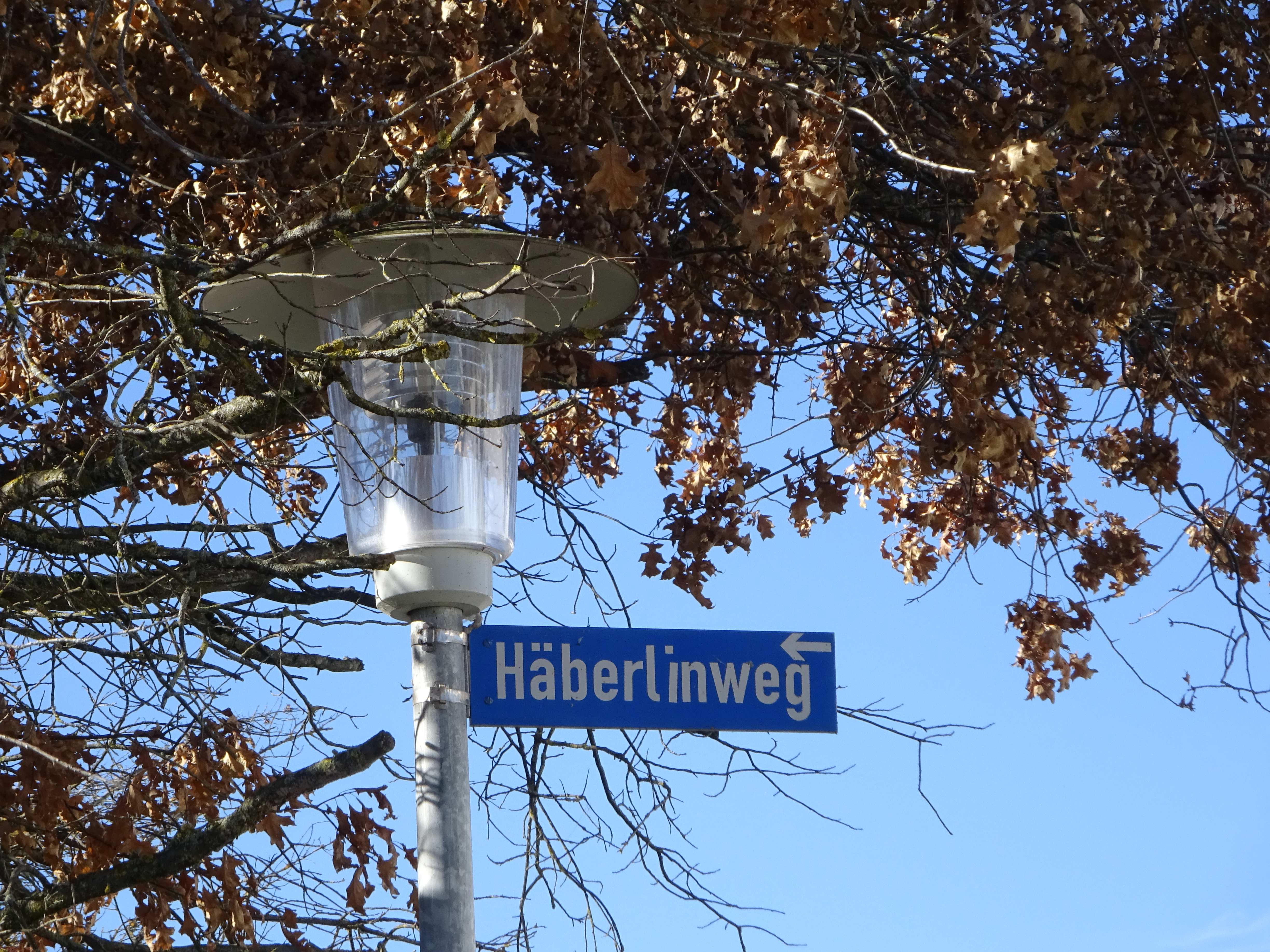 Häberlinweg in Leubas (Kempten), benannt nach Hans Häberlin aus Bad Grönenbach